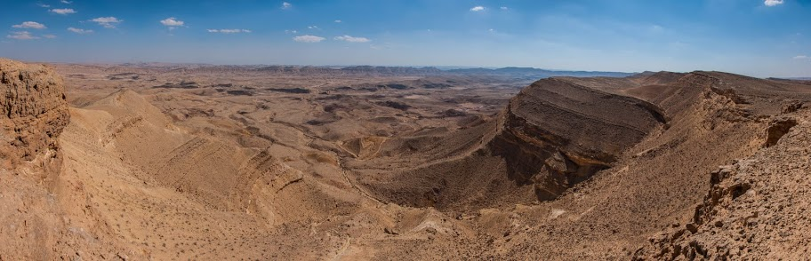 תמונה פנורמית של המכתש הגדול, כעשר דקות נסיעה מירוחם